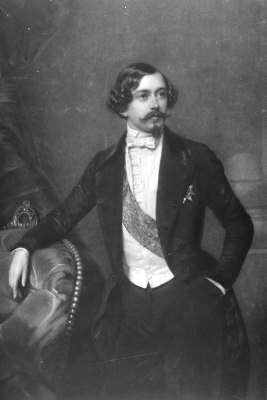 Felix Lichnowsky, gravure van H. Sagert naar een olie op doek, niet gesigneerd (Liszt Museum in Weimar).